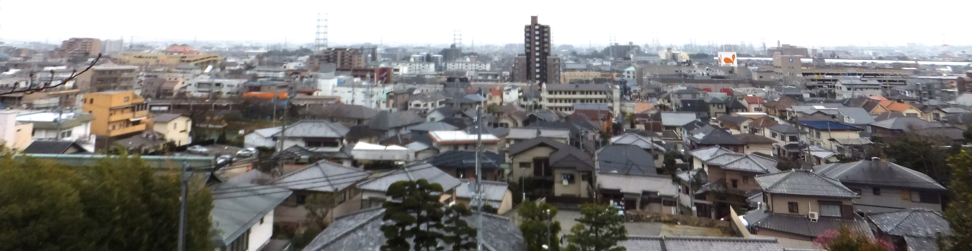 宝塚市街地